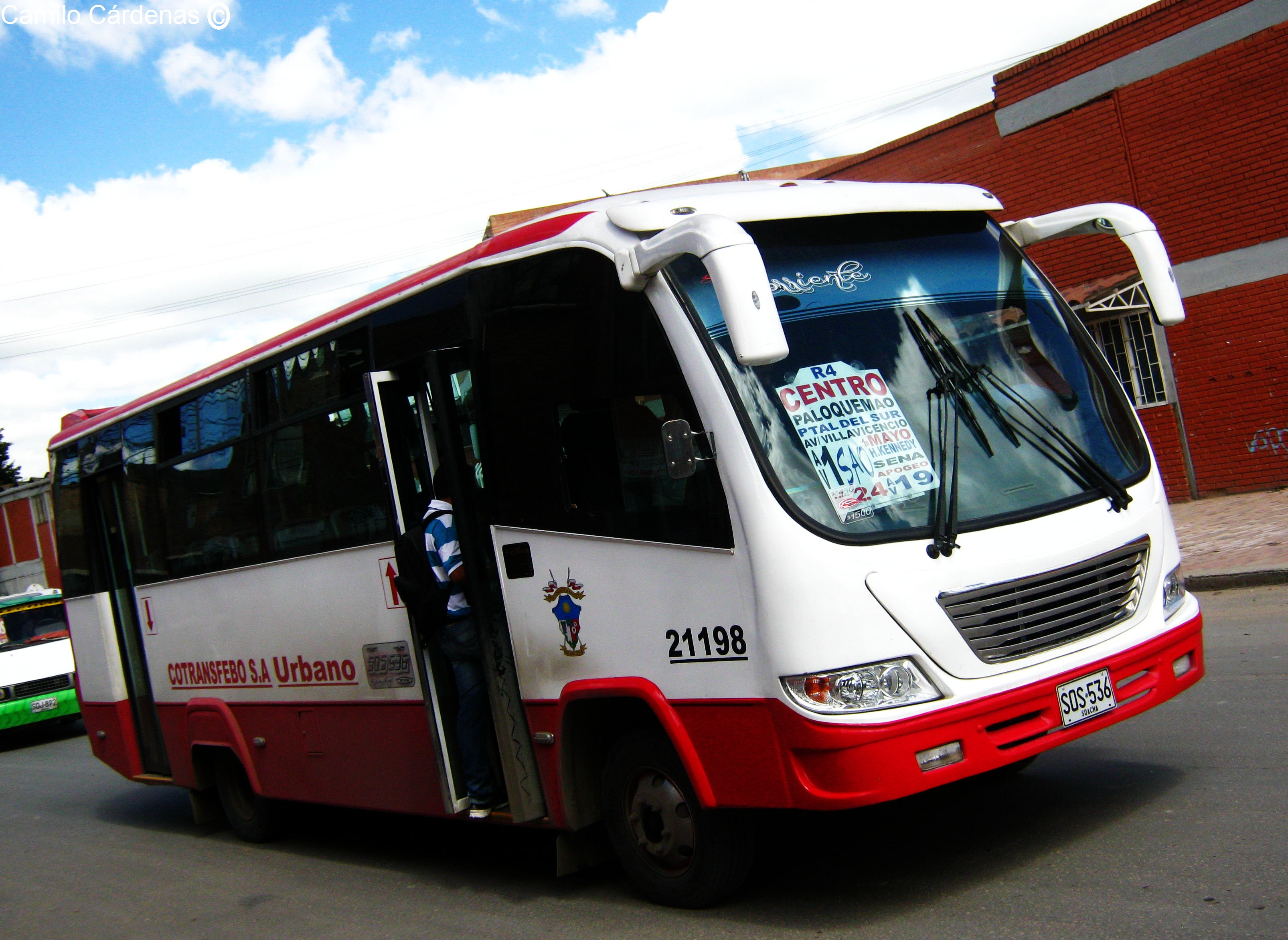 Nuevos Vehículos para el corredor Bogotá-Soacha